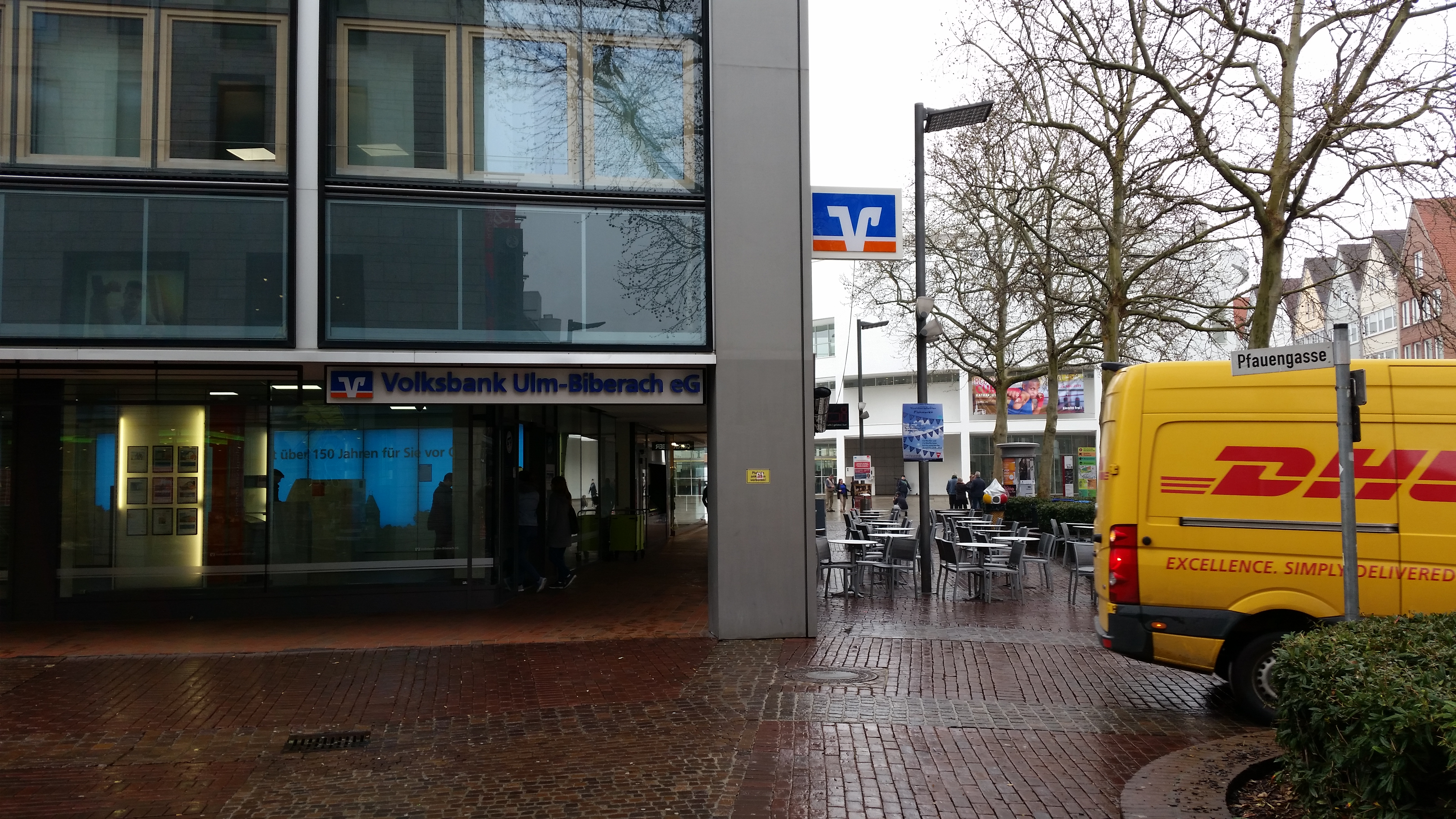 Ulm/Donau; 2019